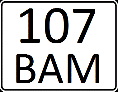 Мотоциклетный/прицепной номер Киргизии